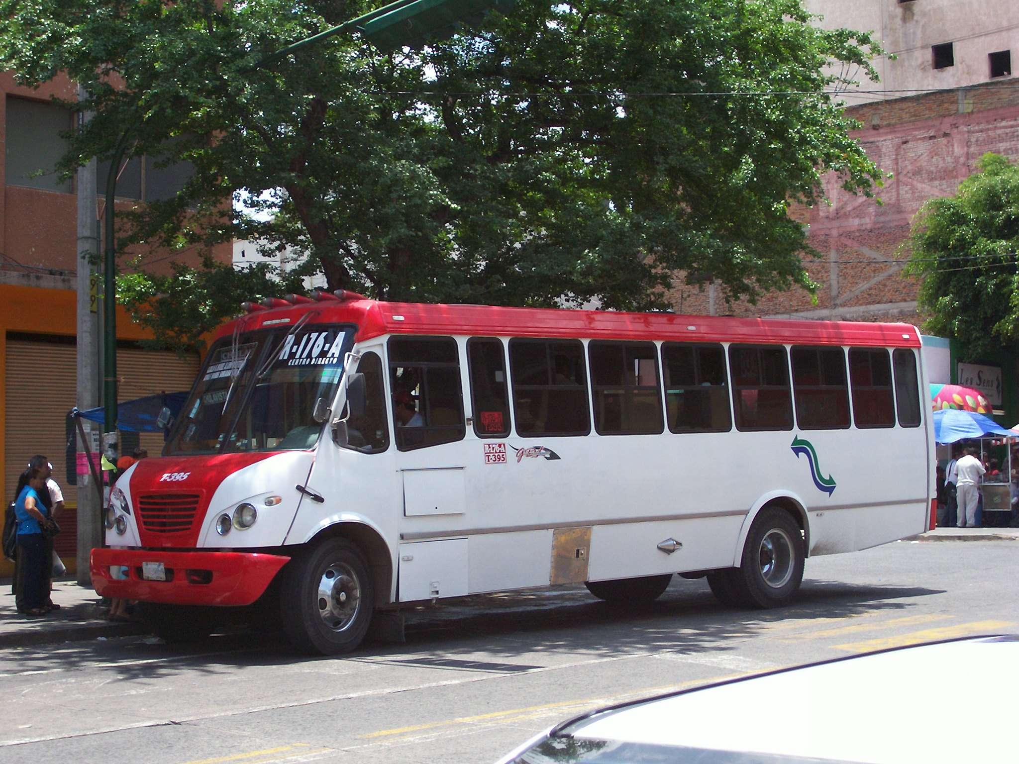 Autobus de la empresa de Transporte guadalajara, TUTSA ((Transportistas Unidos de Tlaquepaque S.A.) ó GDL - Tlaquepaque.